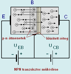 Tranzisztor p-n átmeneteinek működése